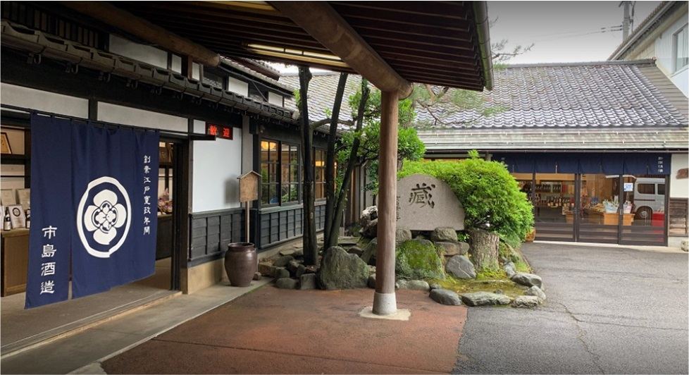 市島酒造の外観